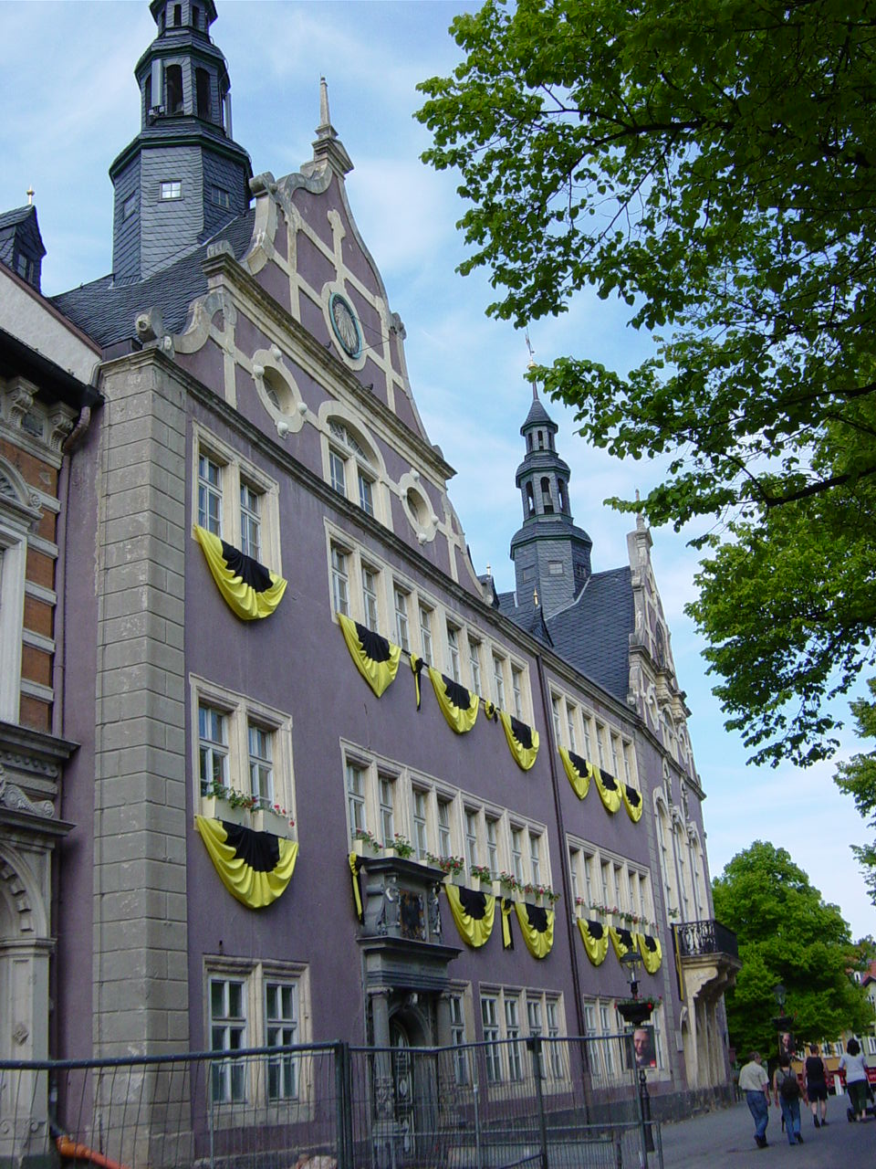 Arnstadt, Rathaus